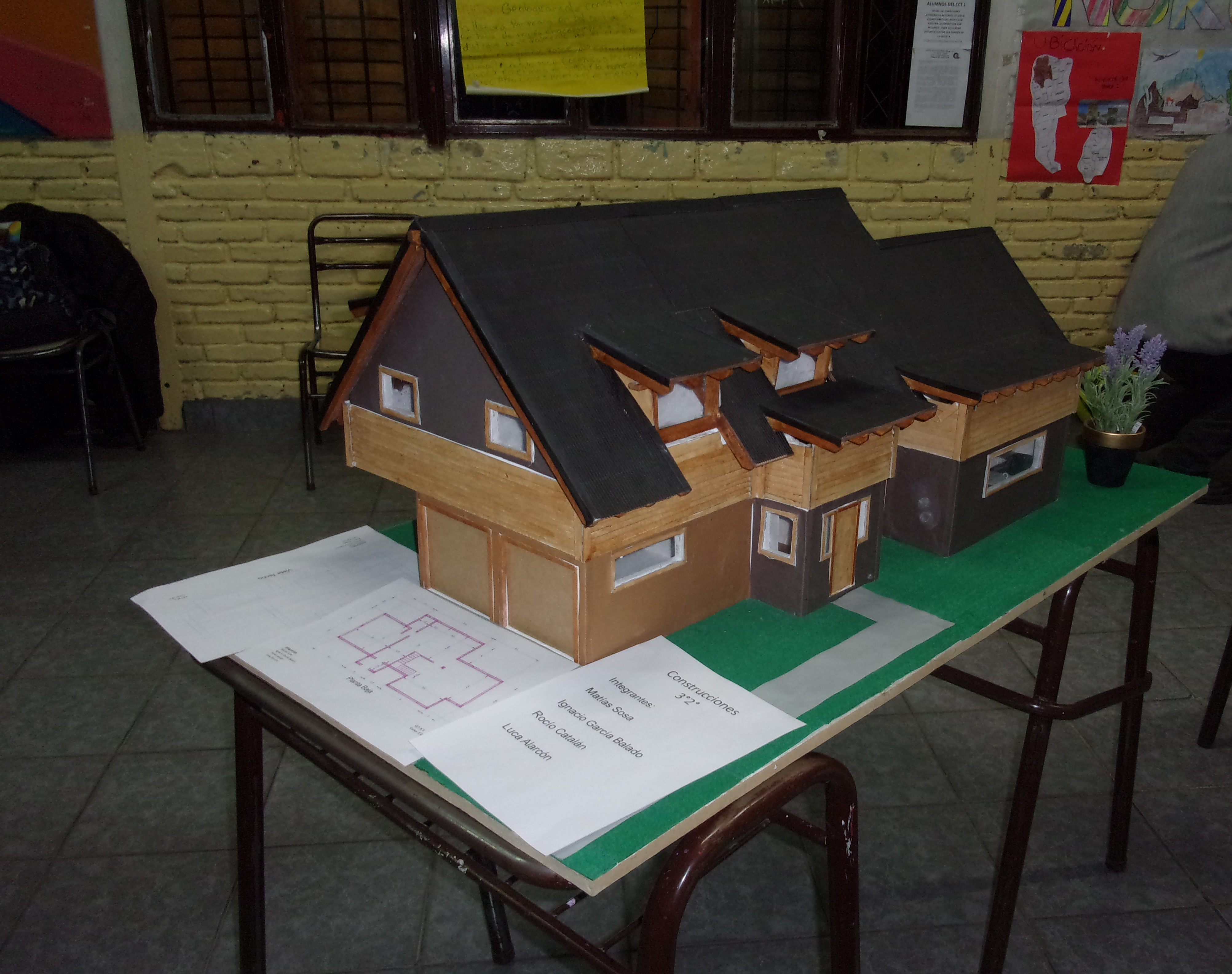 Maqueta elaborada por estudiantes de Centro de Capacitación Técnica N°1. Bariloche. Rio Negro